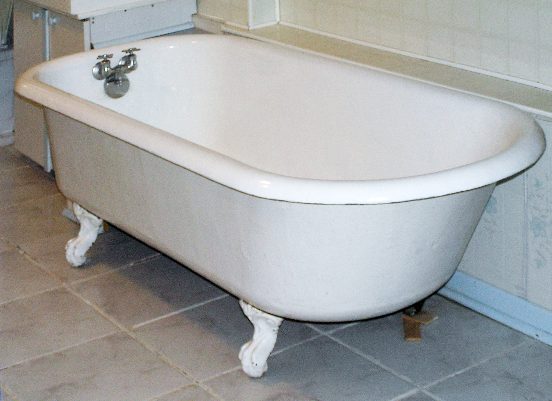 Bañera antigua de hierro fundido Cast Iron Clawfoot bathtub, photo taken by Yannick Trottier, 2005